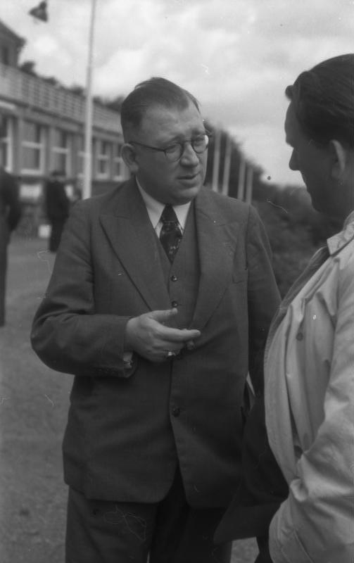 Ministerpräsidenten-Konferenz der Länder der 3 Westzonen Deutschlands auf dem Berghotel Rittersturz in Koblenz (Dr. Adolf Süsterhenn) 8.-10.7.1948